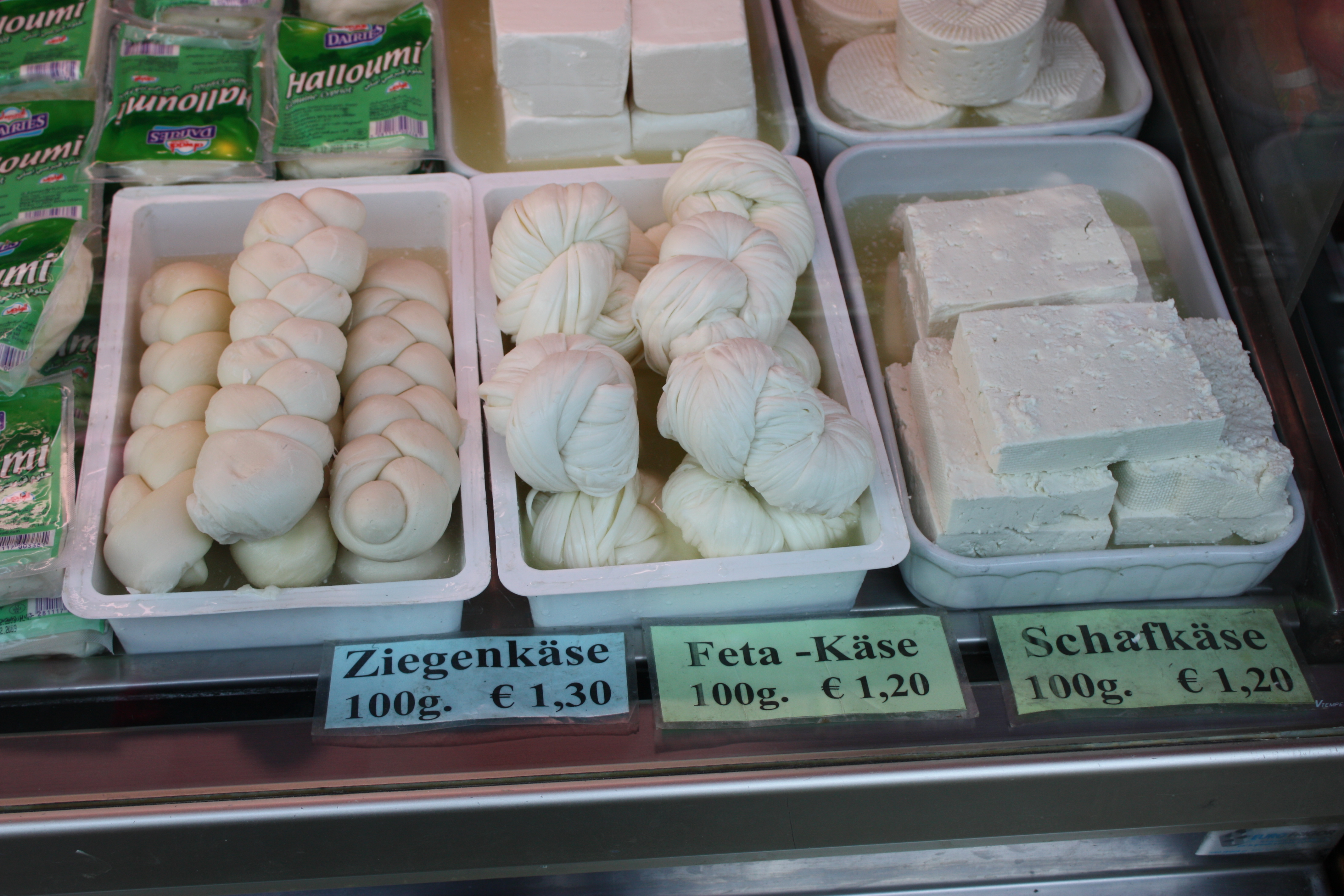 Naschmarkt, Vienna, Wien; Ziegenkäse, Fetakäse, Schafkäse, Käsezopf